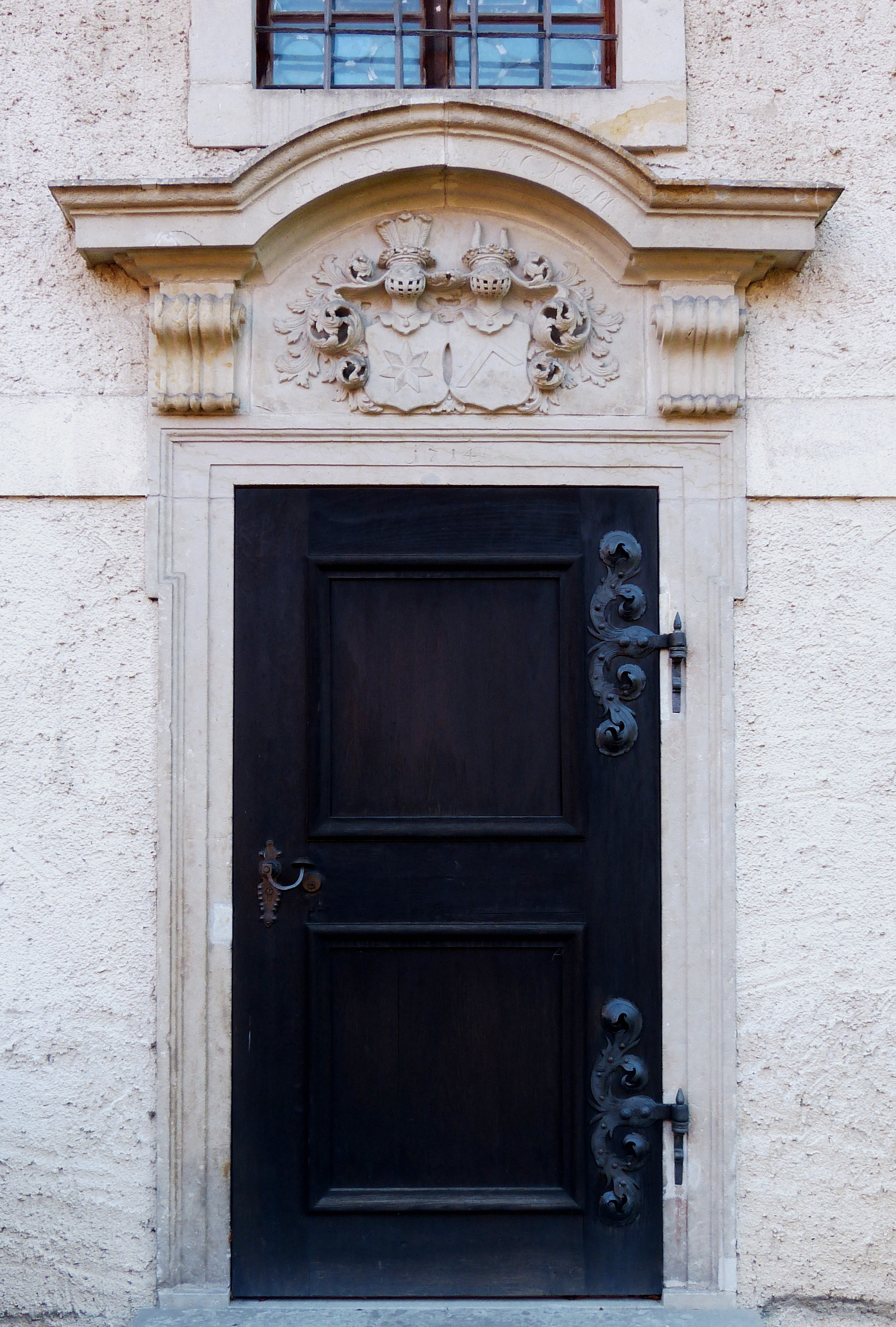 Sandsteinportal mit den Lettern C. H. K. O. und A. C. K. G. M. darunter das Allianzwappen der Gutsherren v. Knoch.